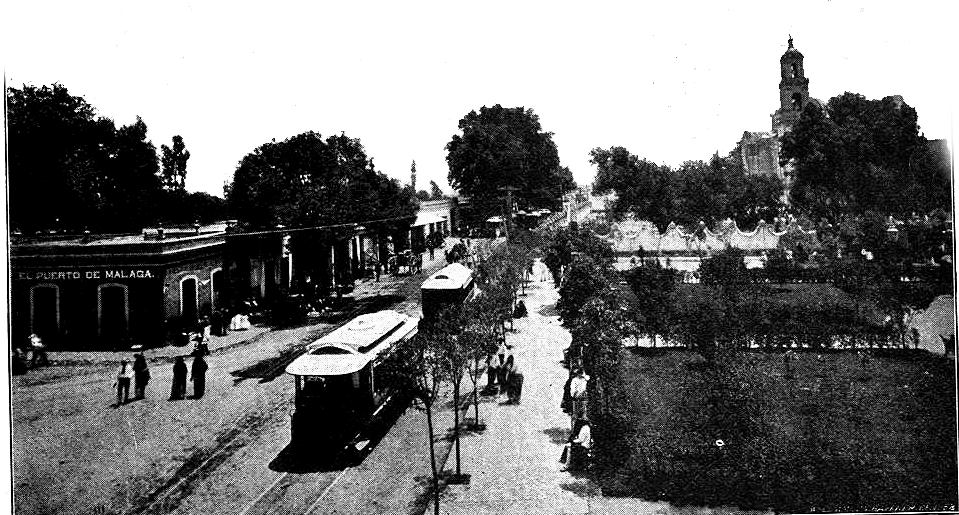 Vista de sur a norte de la alameda de Tacubaya, proveniente del libro México Ilustrado, Distrito Federal, su descripción, gobierno, historia, comercio e industrias, Edicion Bilingue Español E Ingles, Tomo VII, Gobierno del Distrito Federal, Mexico, 1903. Pag. 120.